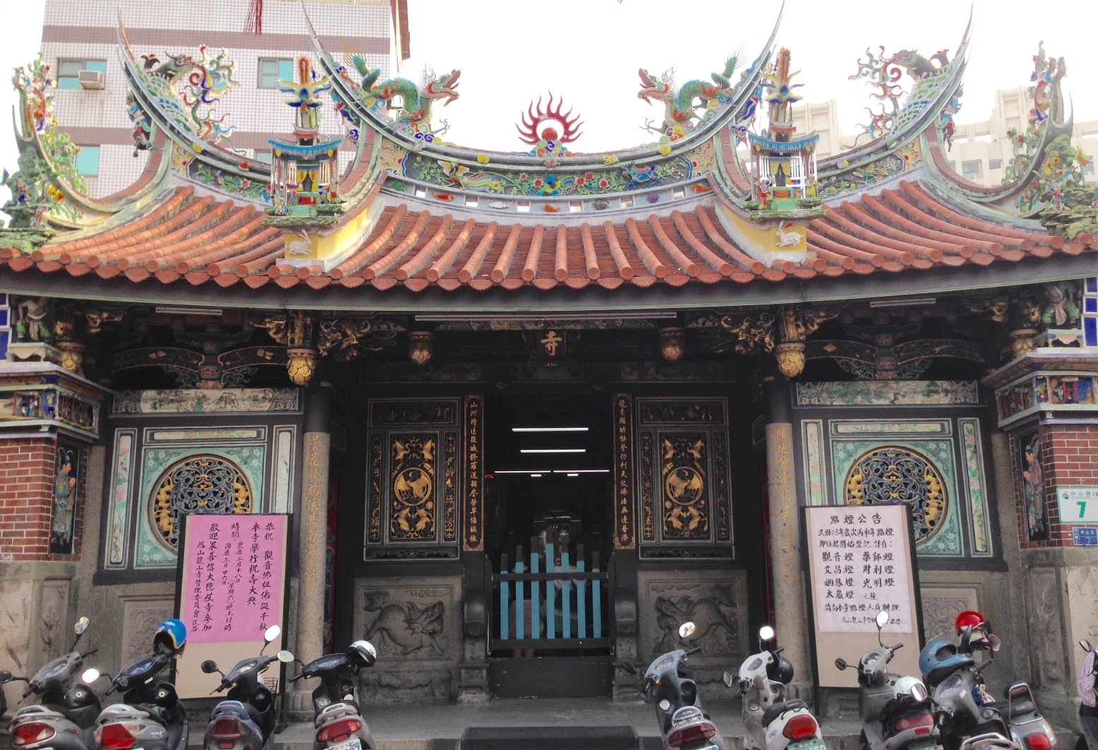 鳳山龍山寺正殿